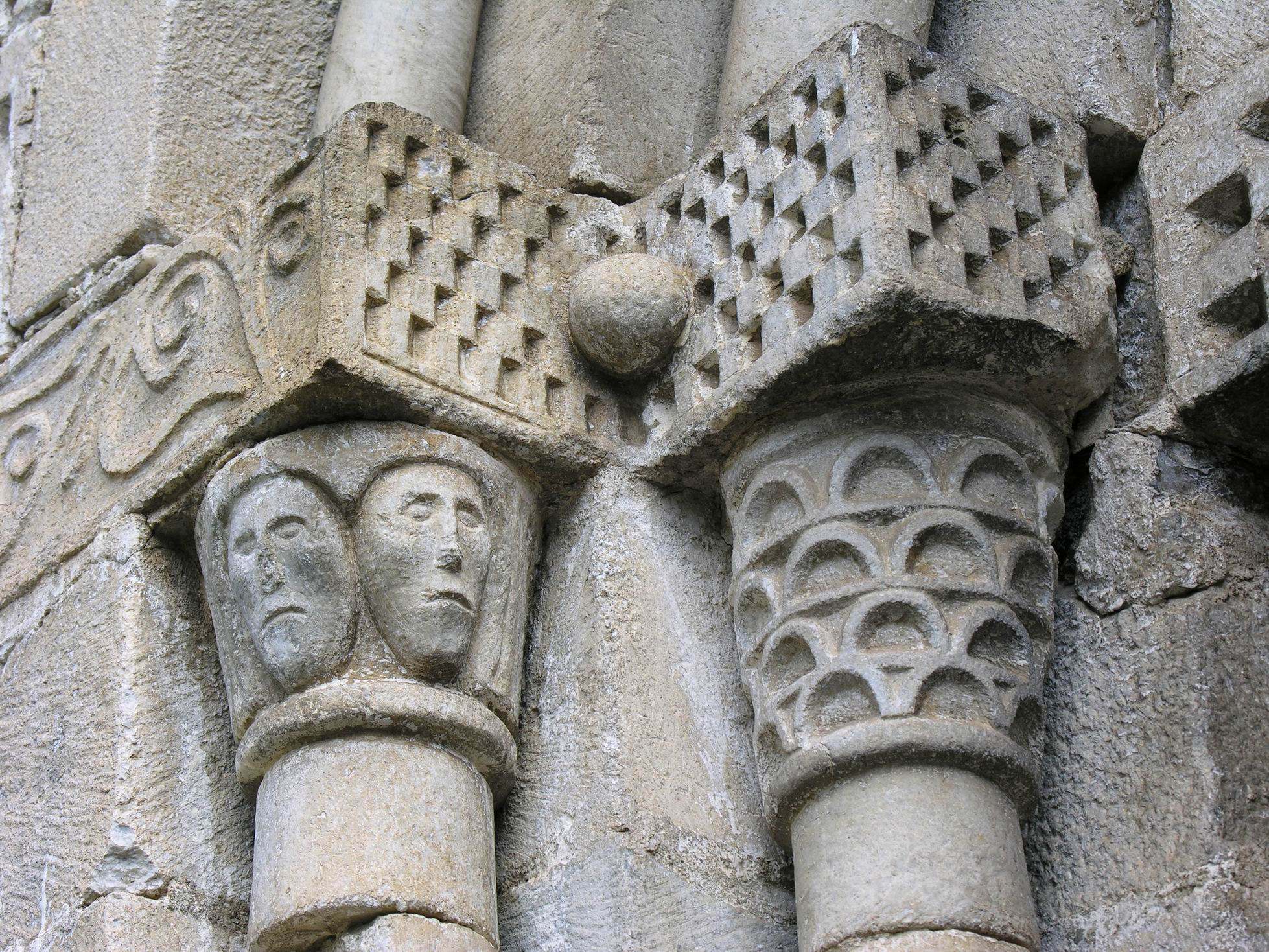 Detall de la portalada de sant pere d'Escunhau